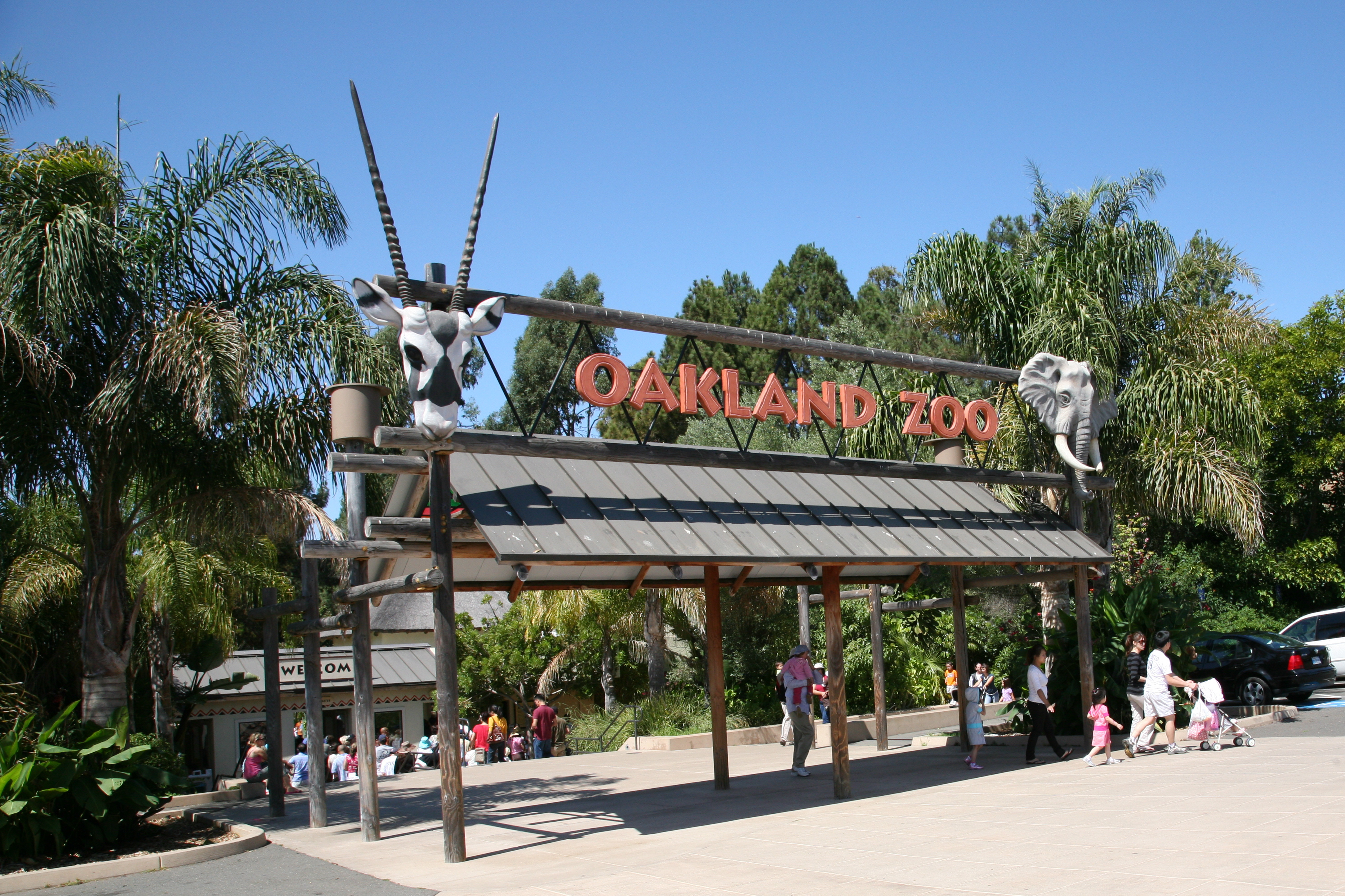 Oakland Zoo entrance - 2008